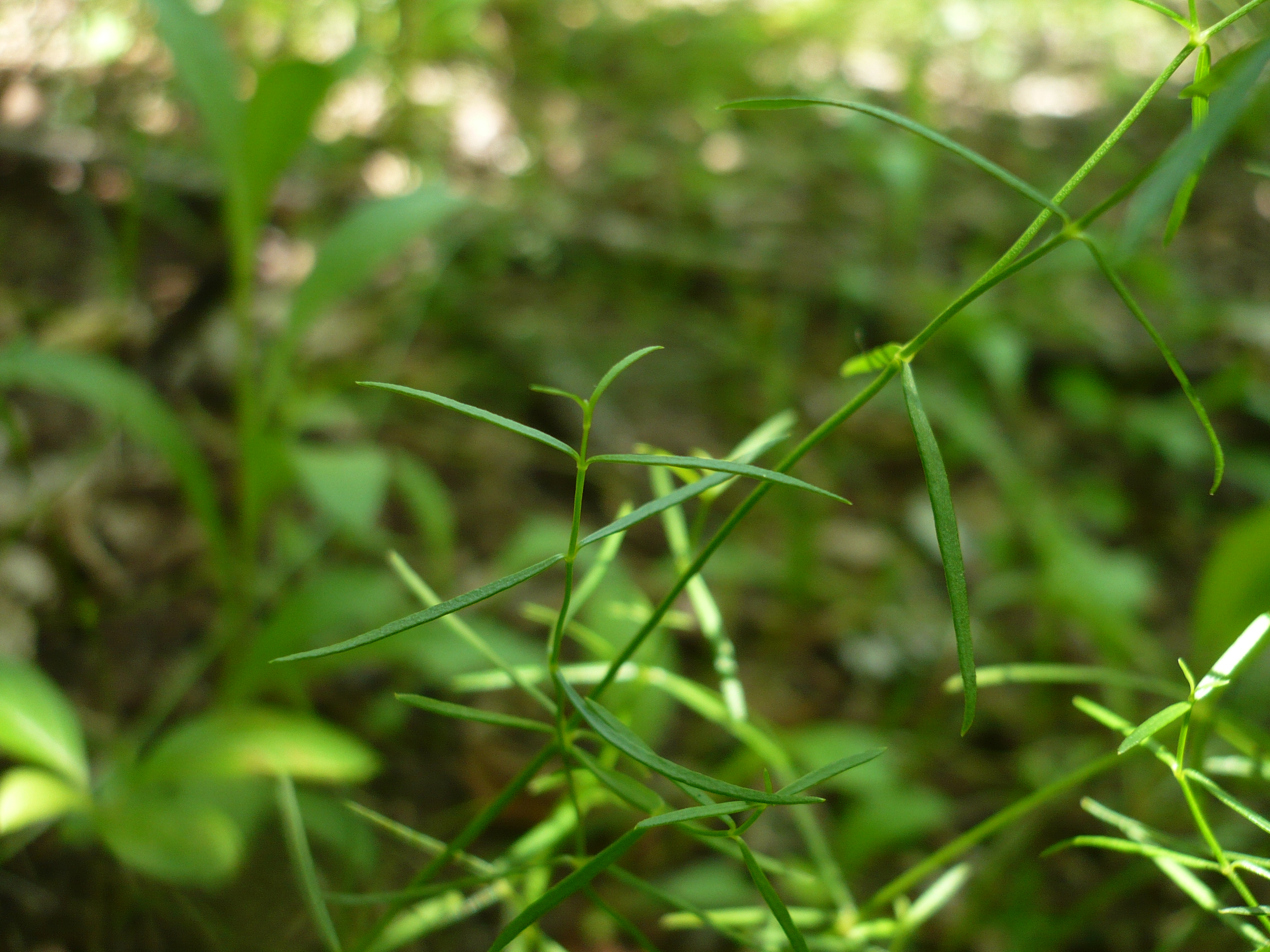 Подмаренник красильный, или Ясменник красильный (Asperula tinctoria). Балка Каменный лог, Белгородская область.